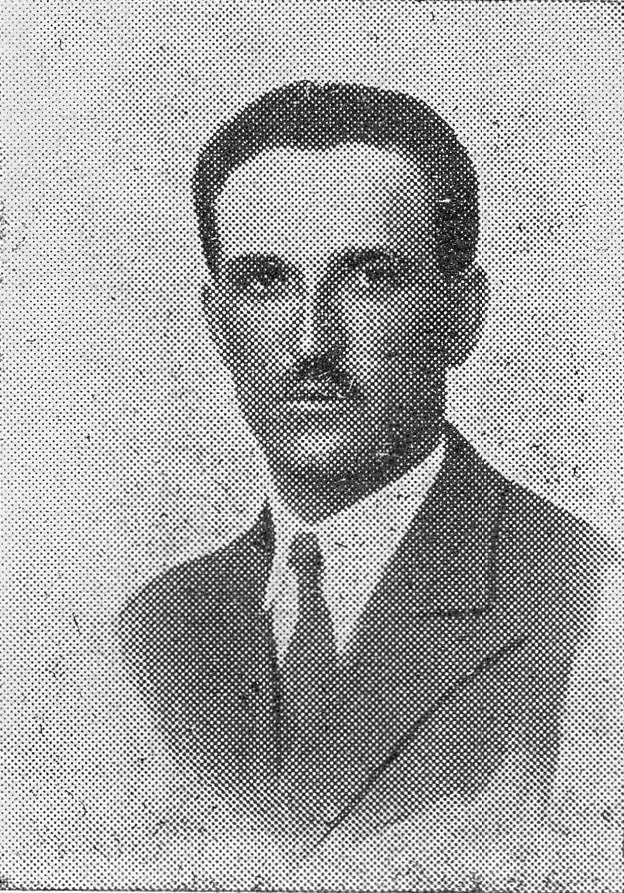 Poseł na Sejm IV kadencji (1935–1938) II Rzeczypospolitej